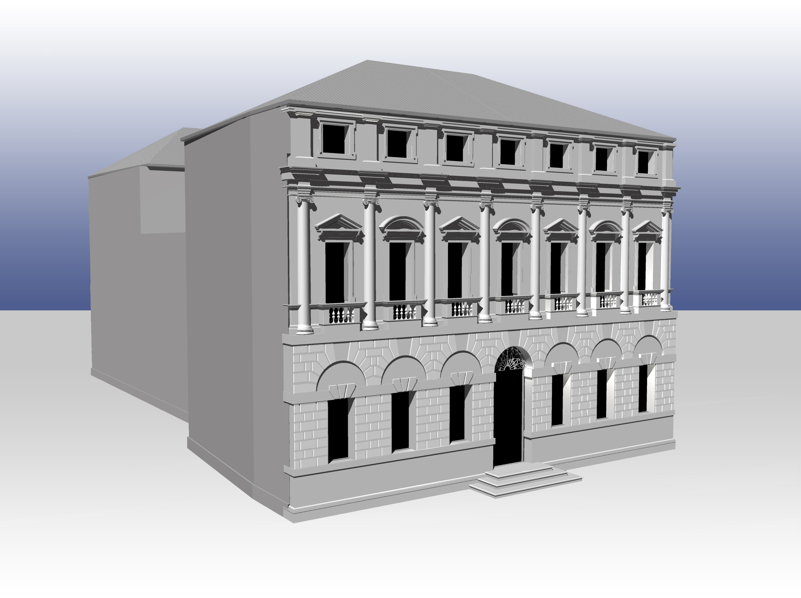 Render della ricostruzione di Palazzo Porto (ora Festa) a Vicenza, di A. Palladio, fatte in base alle tavole presenti su "I Quattro libri dell'architettura" dell'omonimo autore, e su E. Forssman, "Palazzo di Porto Festa a Vicenza", C.I.S.A. Palladio, Vicenza 1973